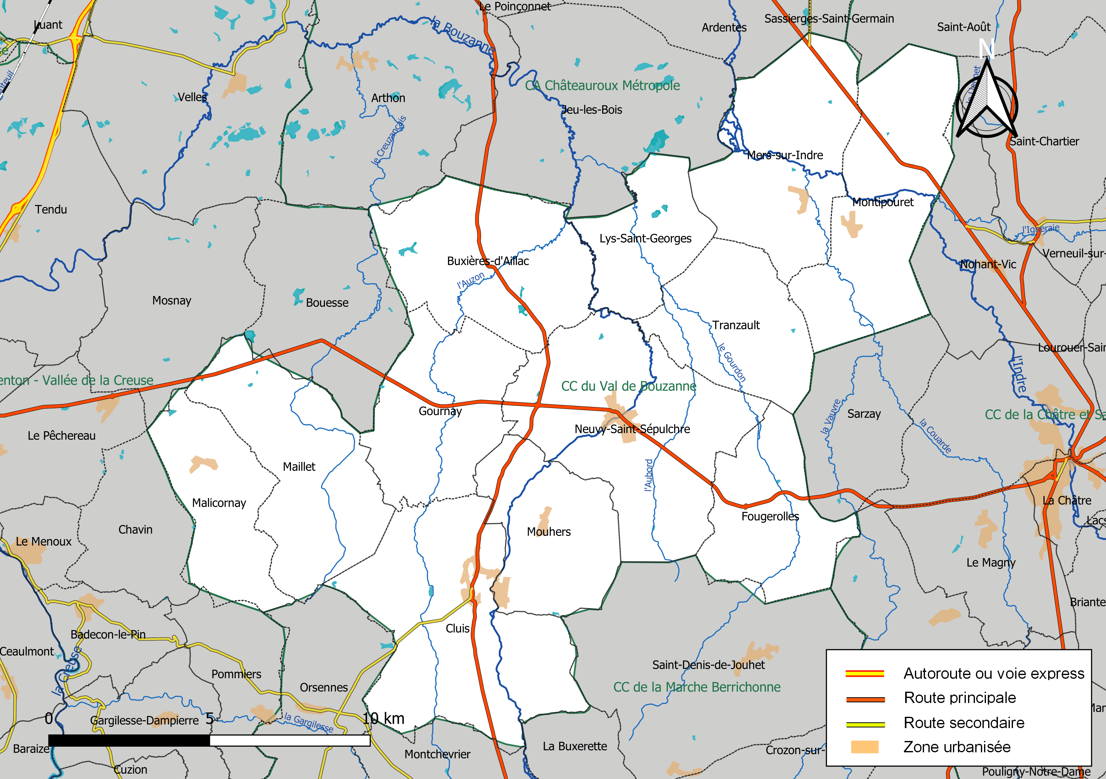 Carte de la communauté de communes du Val de Bouzanne, département de l'Indre, France. Composition au 1er janvier 2019.